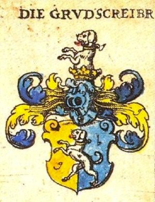 Wappen der Gruttschreiber, schlesisches Adelsgeschlecht.